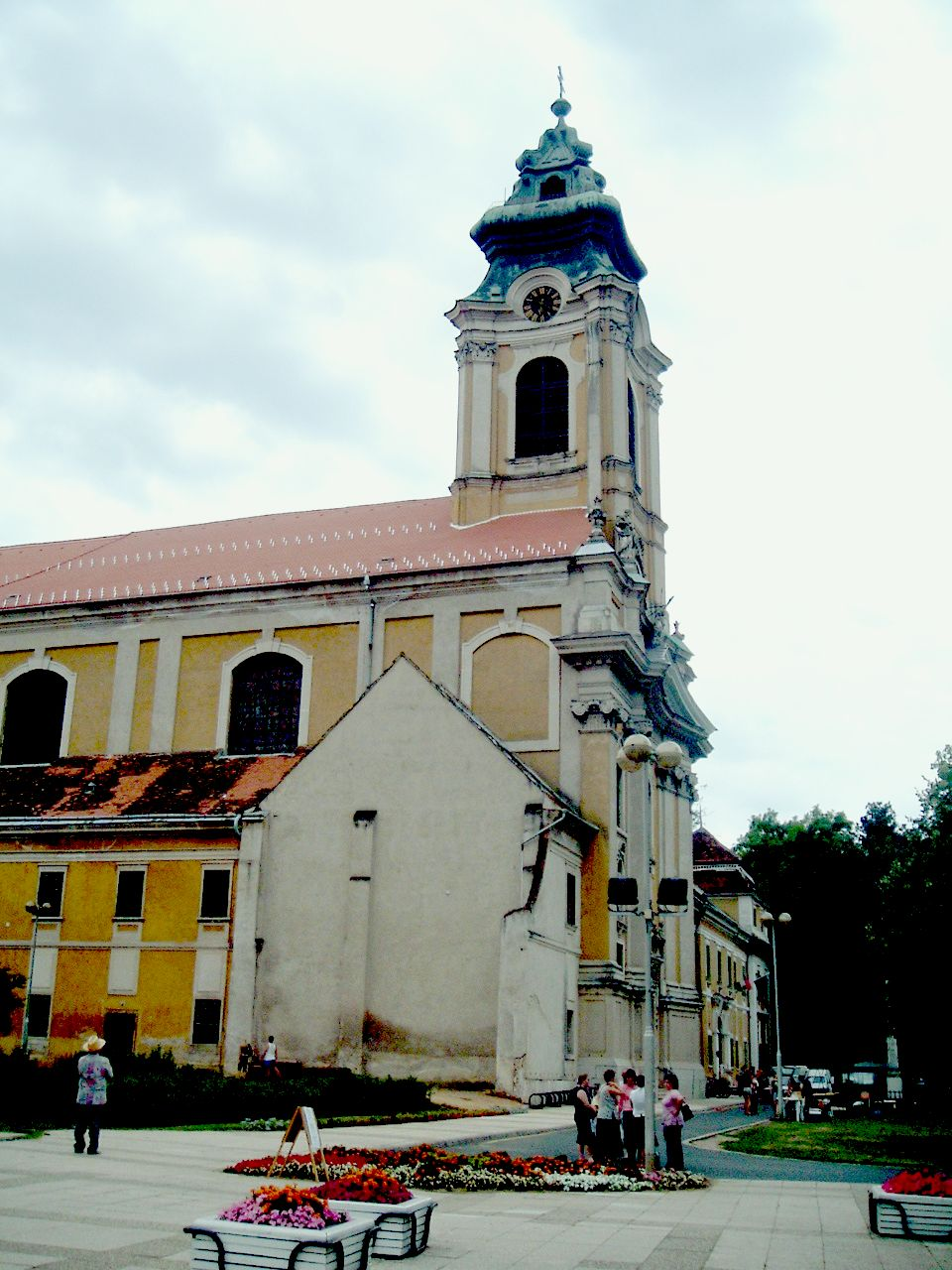 Nagyboldogasszony római katolikus templom, Szentgotthárd